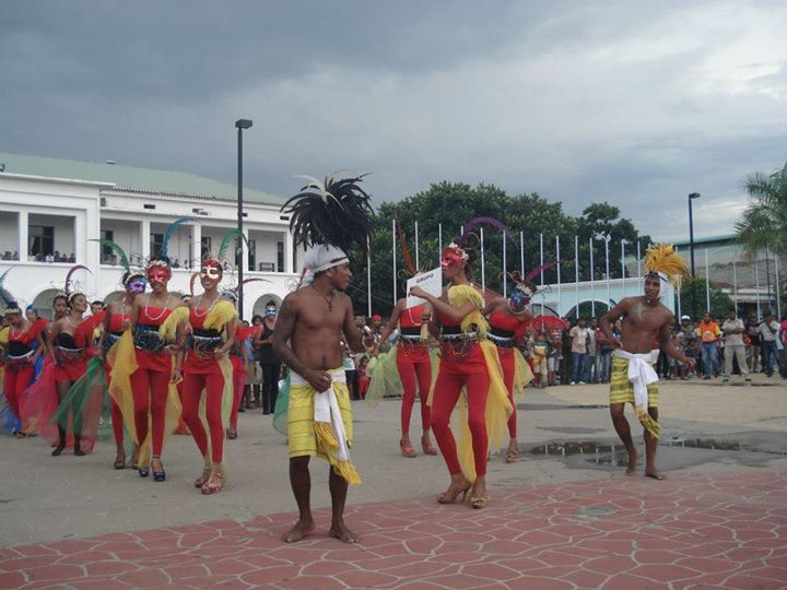 Carneval em Dili